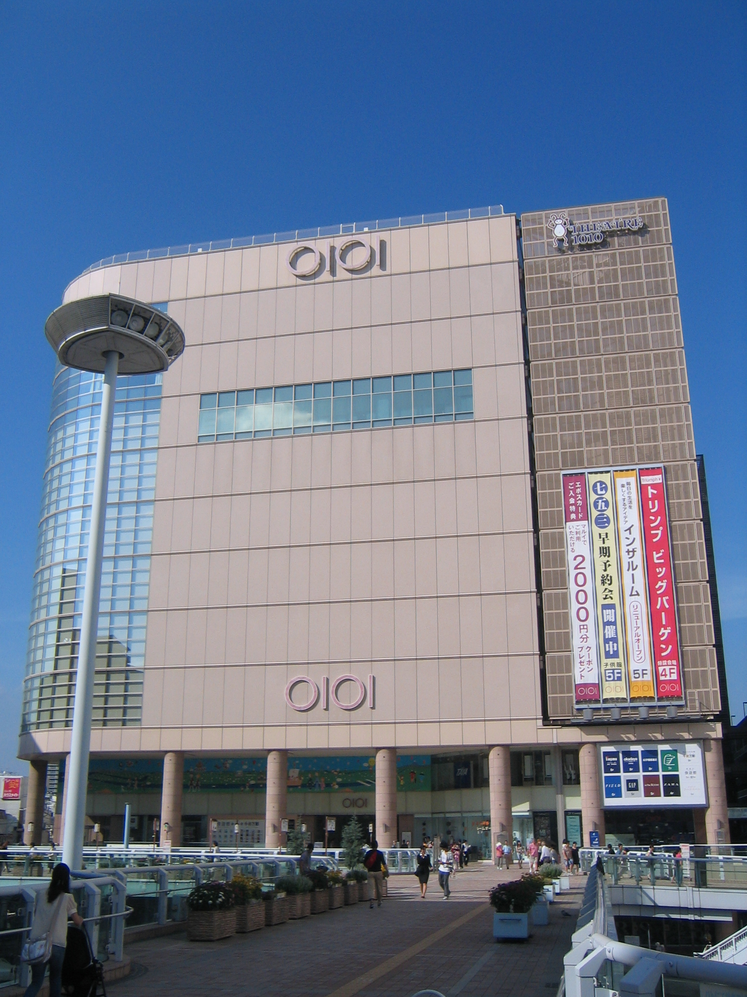 千住ミルディスＩ番館。東京都足立区千住3-92。北千住マルイ、シアター1010などが入居。